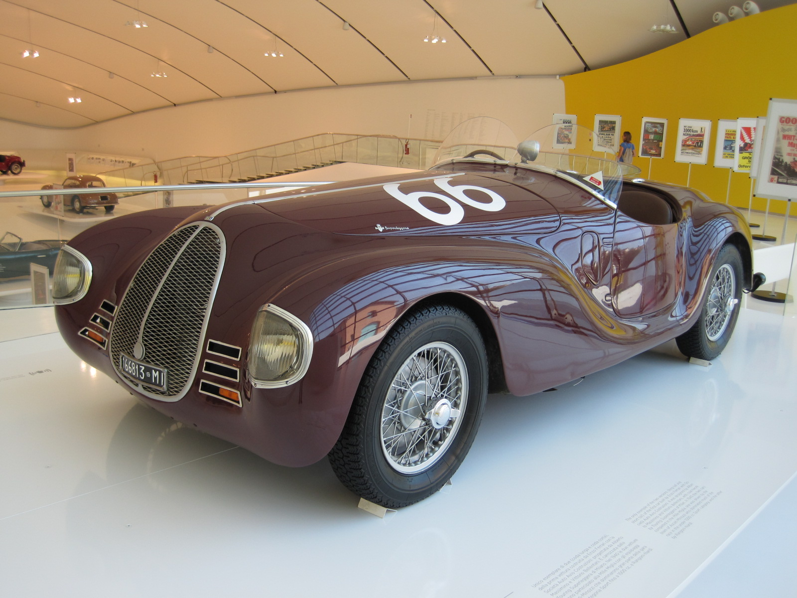 Automobiles in Enzo Ferrari Museum in Modène - Auto Avio Costruzioni 815 - 1940